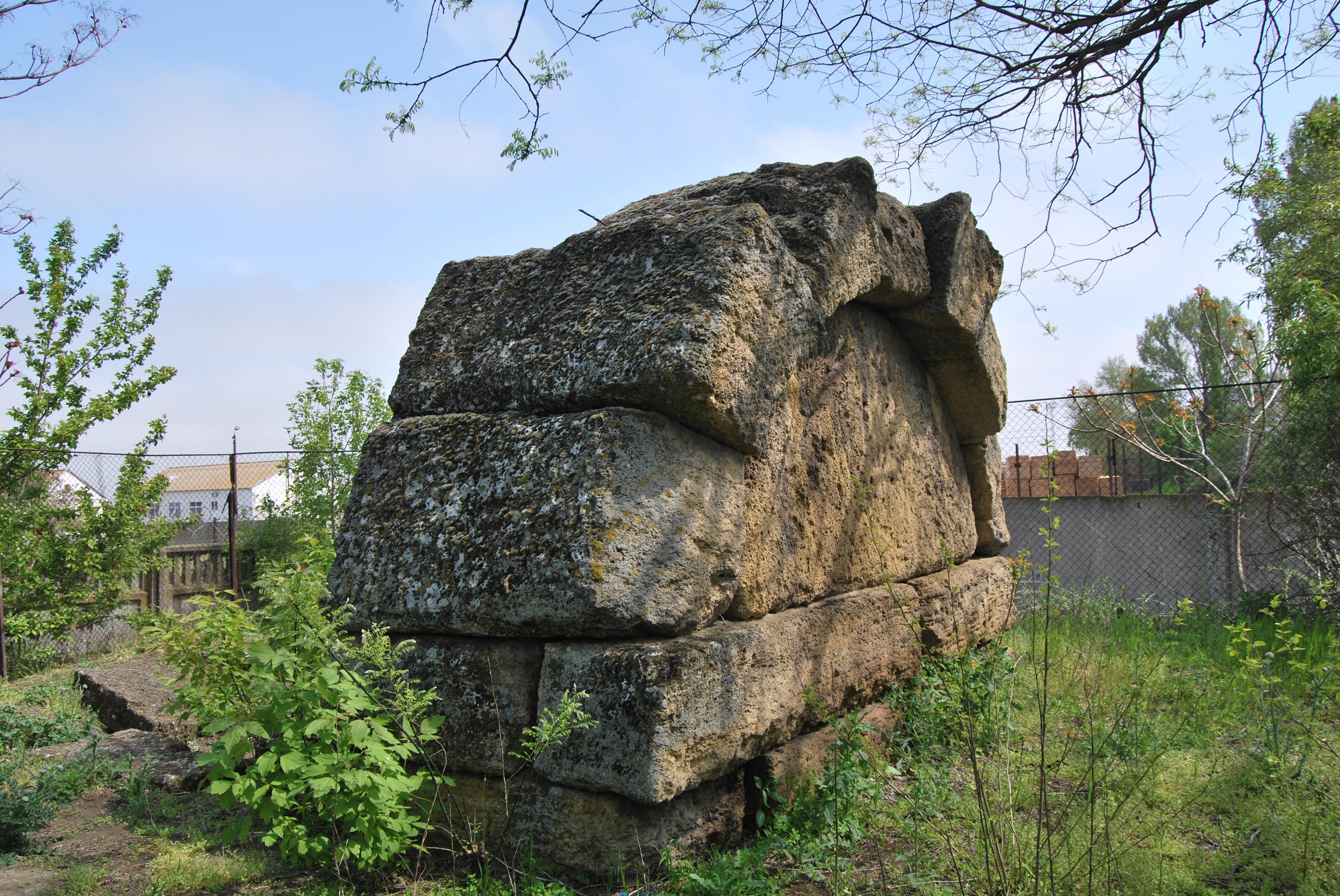 Склеп підкурганний «Скіфська Могила», Білгород-Дністровський, біля м'ясокомбінату